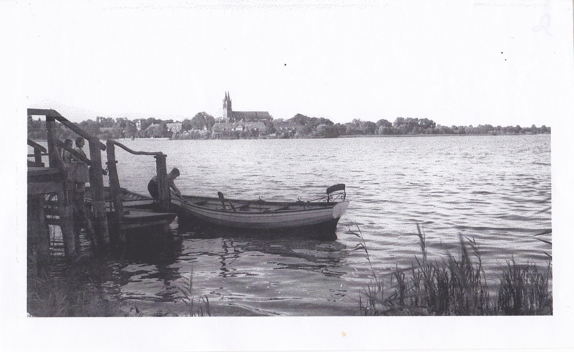 Blick vom Buchholz bei Goldberg über den Dobbertiner See zum Kloster Dobbertin.